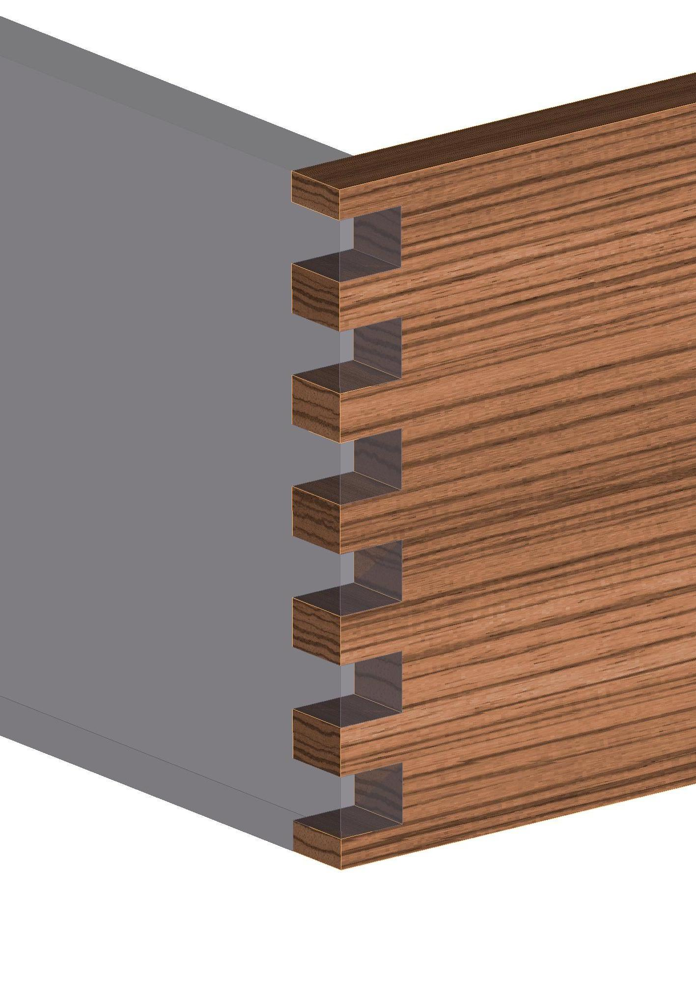 Holz-Eckverbindungen Fingerzinken siehe Holzverbindung.